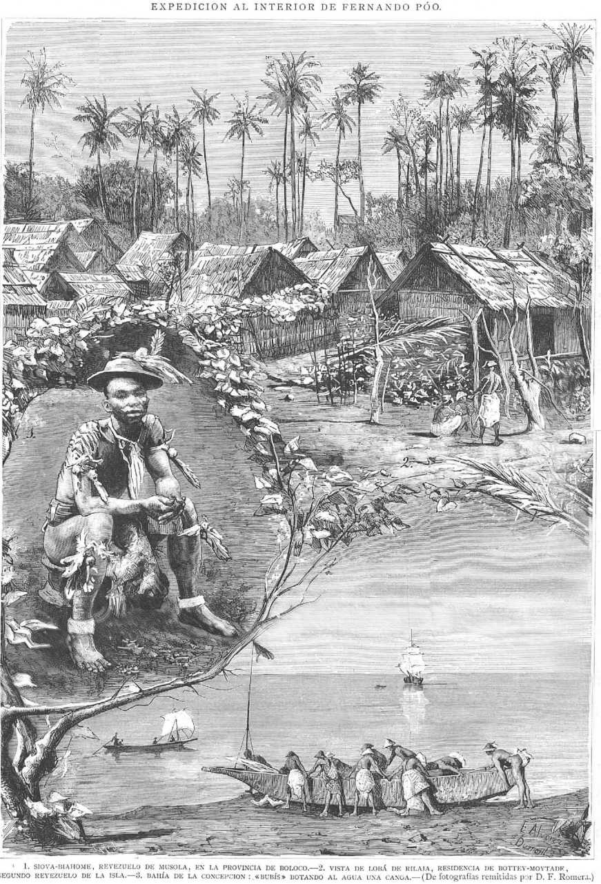 Expedicion en Fernando Poo